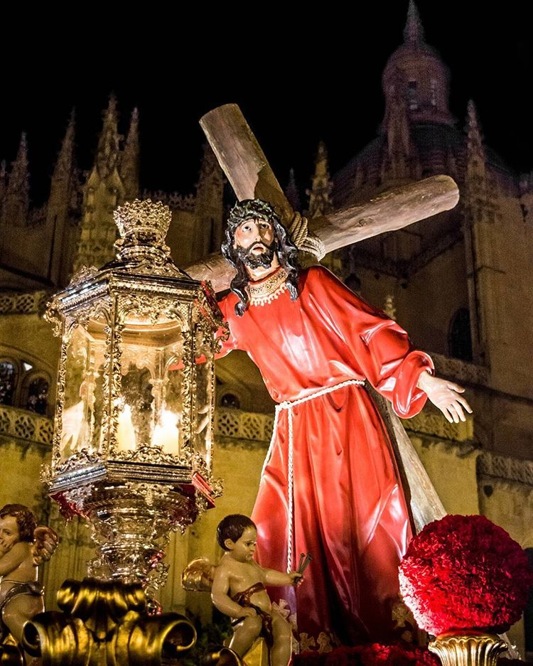 Semana Santa en Segovia This is a photography of a Folklore festival in Spain (Wikidata id Q23310019).